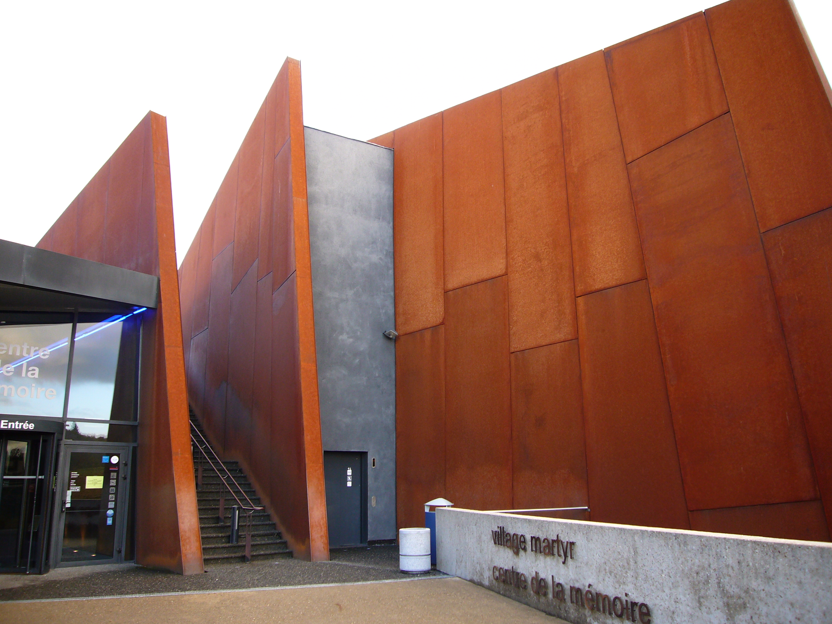 Le centre de la mémoire d'Oradour-sur-Glane (Haute-Vienne, France)